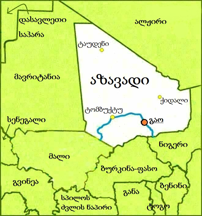 აზავადი რუკა